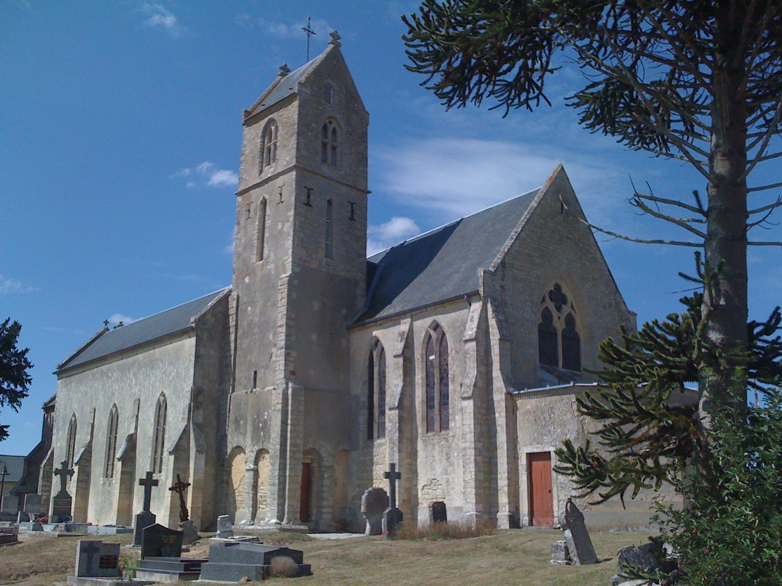 Eglise Saint Pierre de Blay